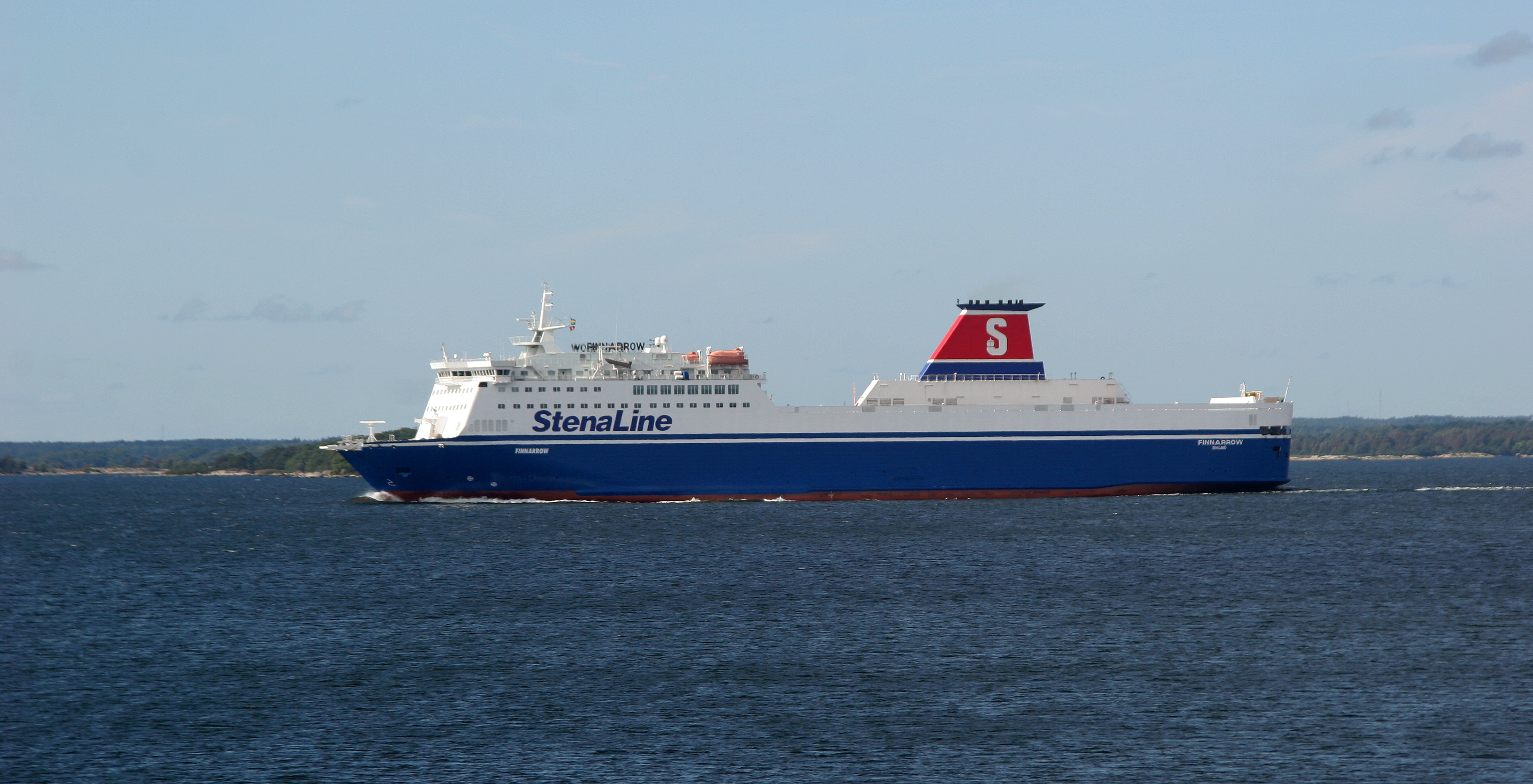 Stena Lines färja Finnarrow lämnar Karlskrona.